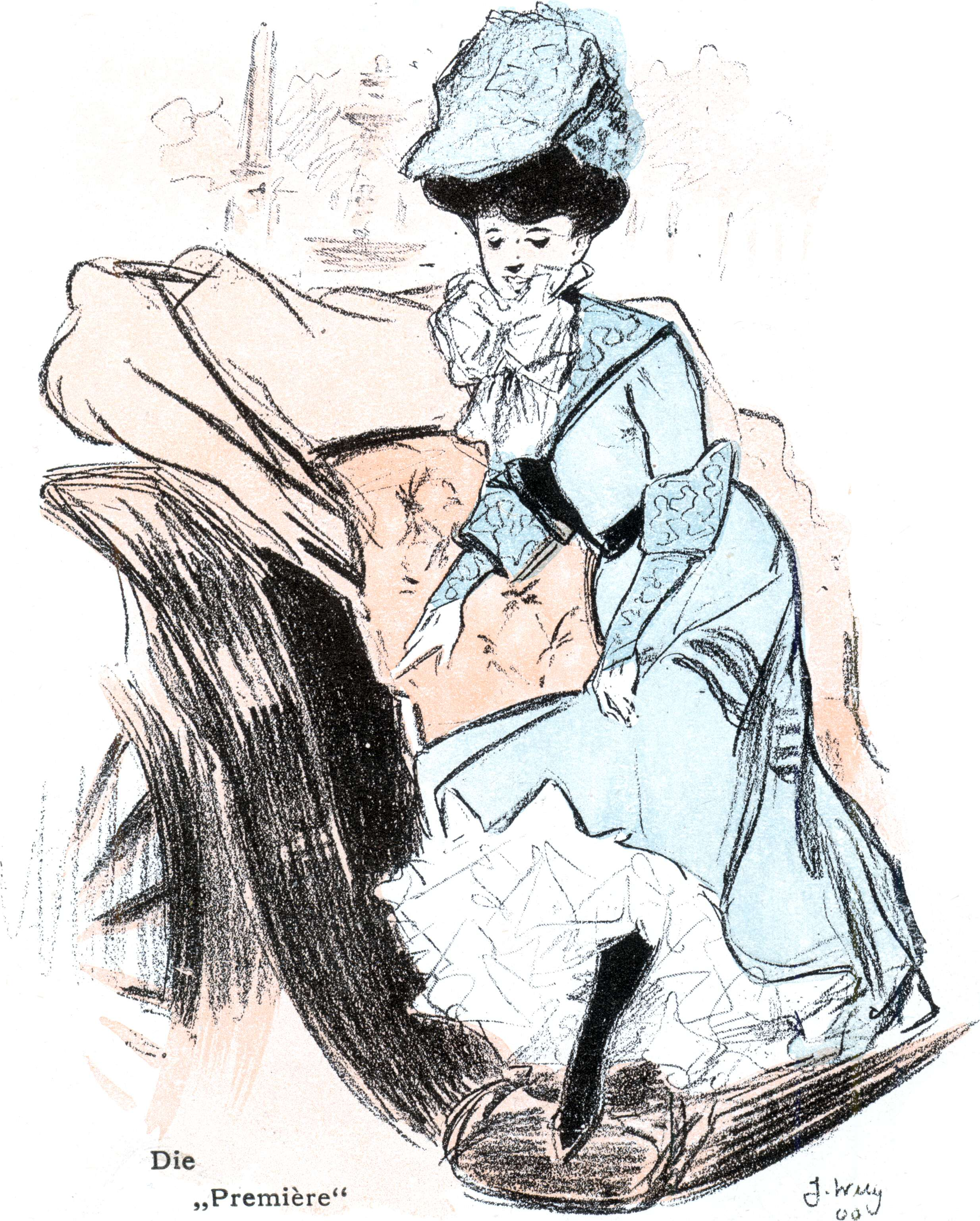 Die ,,Premiere""